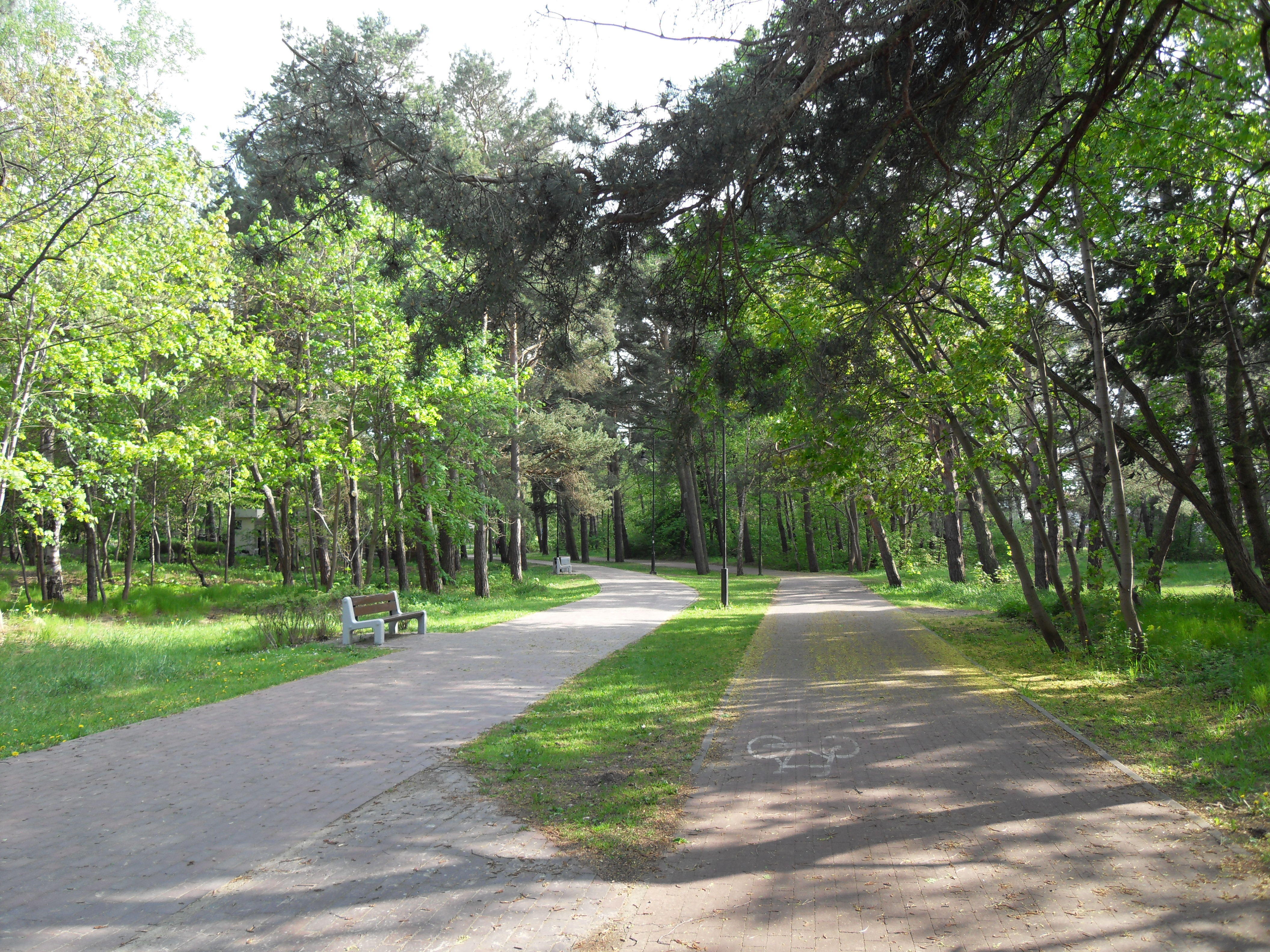 Gdańsk Jelitkowo. Park Jelitkowski (nadmorski park).